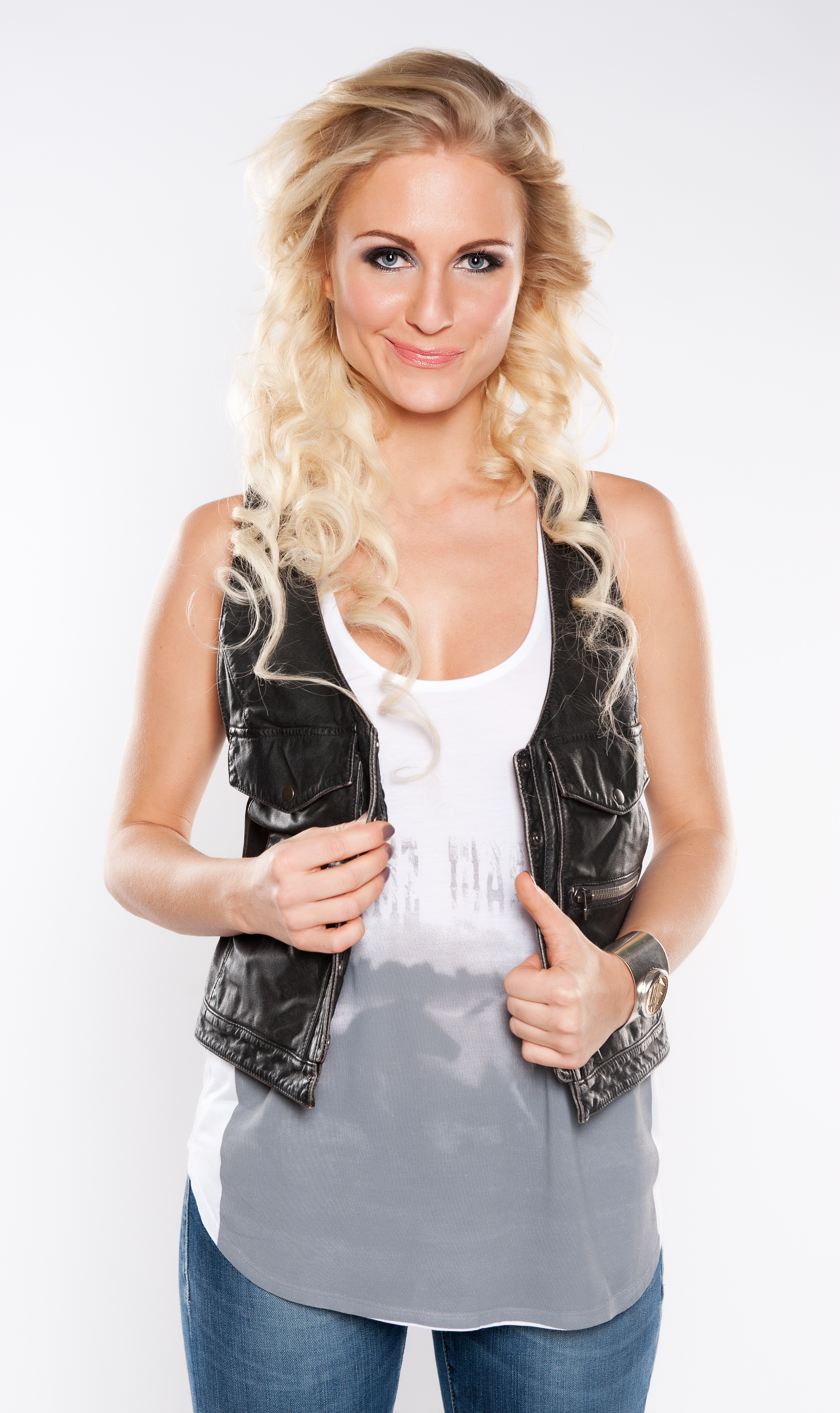 Катя Гордон